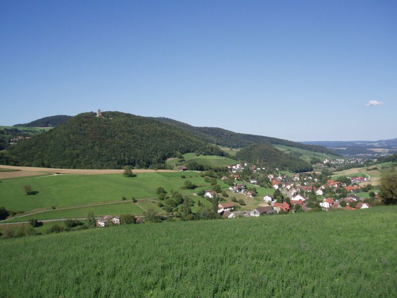 Blick auf Thalheim, das Schenkenbergertal und die Ruine Schenkenberg